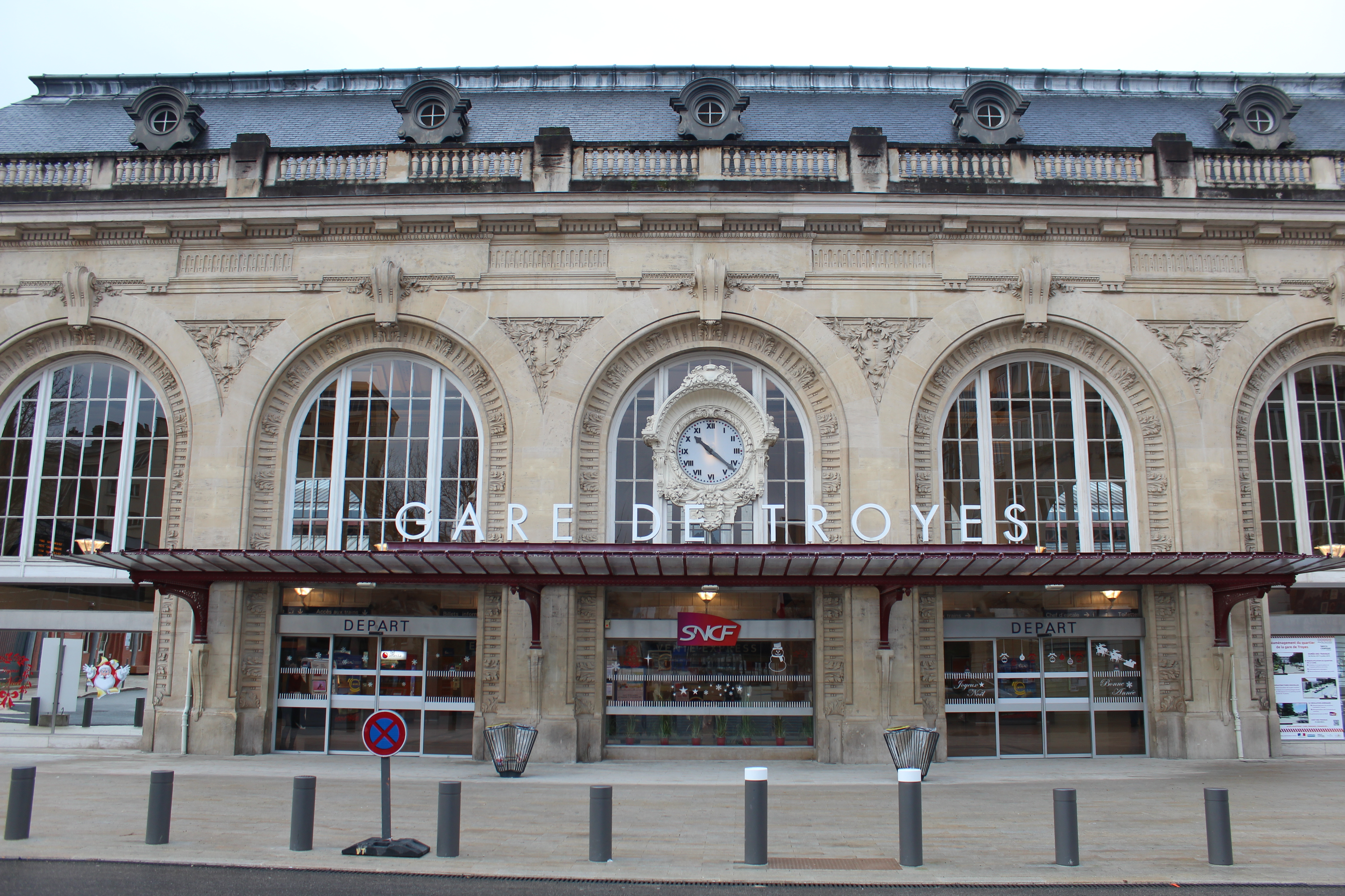 Gare de Troyes.